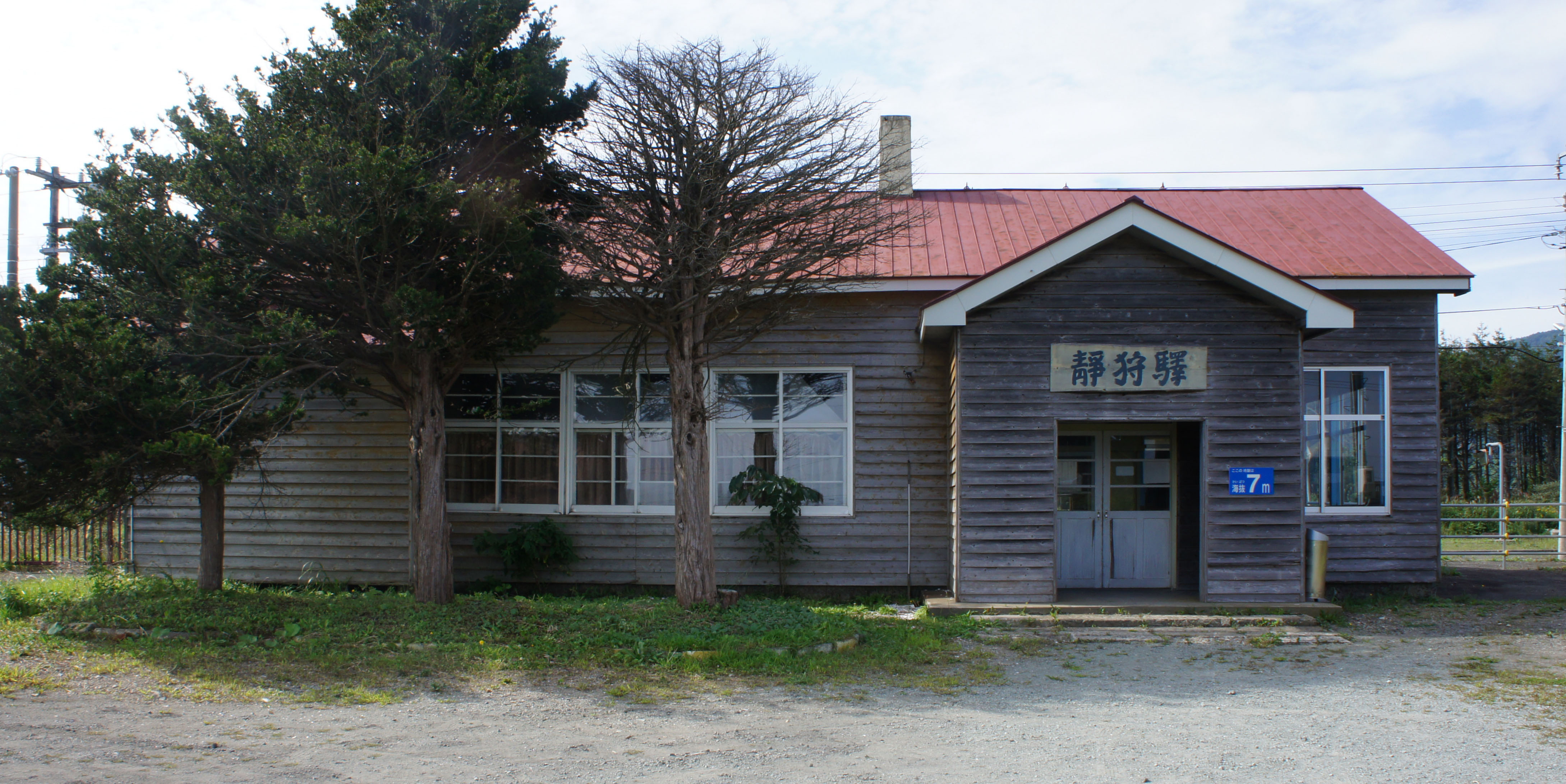 JR室蘭本線・静狩駅の駅舎